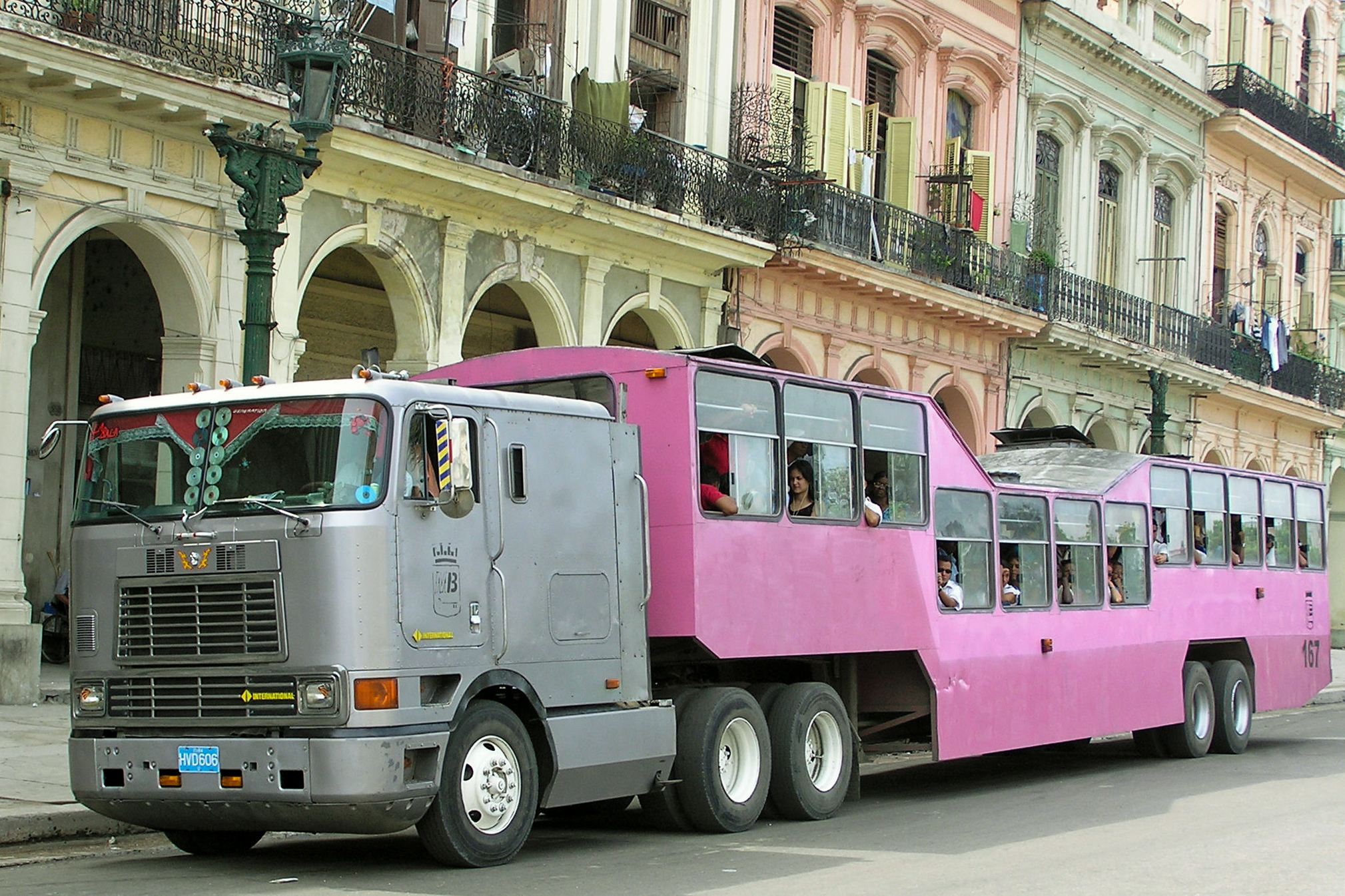 Bus surdimensionné appelé "camelito" dans le quartier du Capitole à La Havane - Cuba